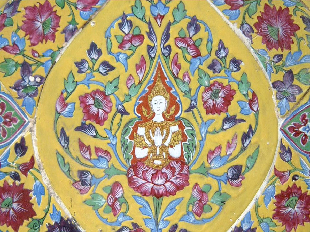 Wat Ratchabopit (วัดราชบพิธสถิตมหาสีมารามราชวรวิหาร), Bangkok, Thailand